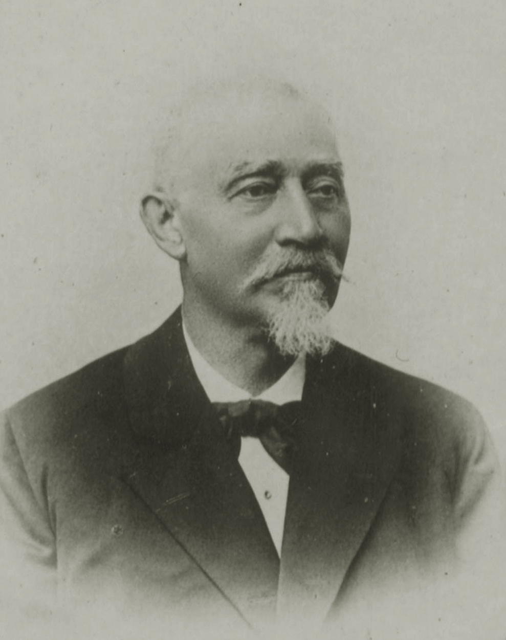 Franz Michael Strzygowski (1828-1904)